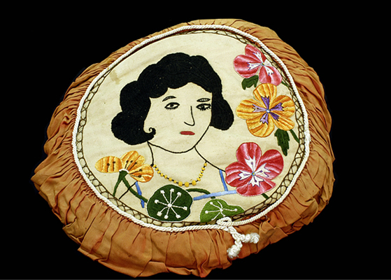 Поставка музеја